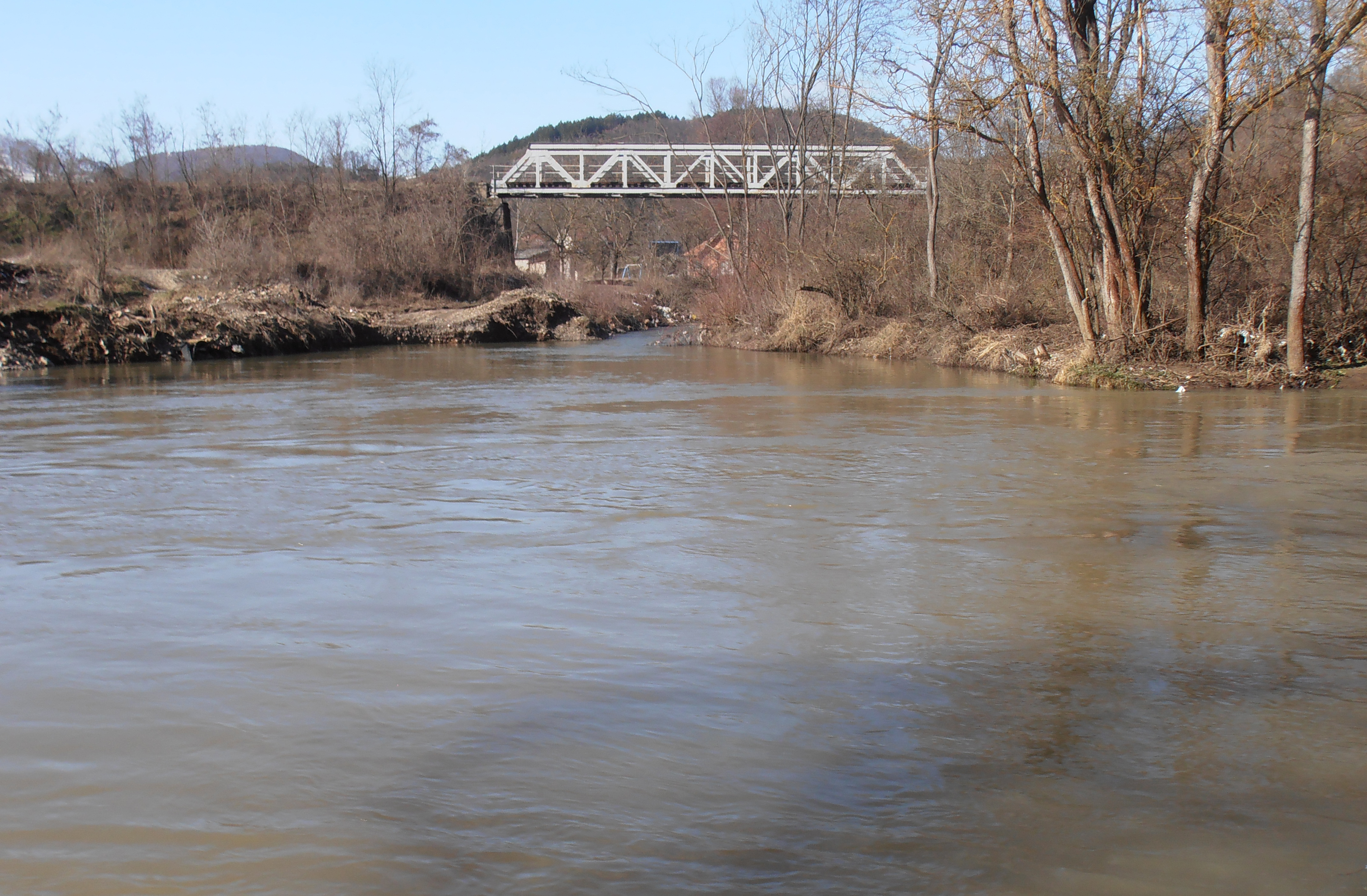 Српски (ћирилица): Дренска река, ушће